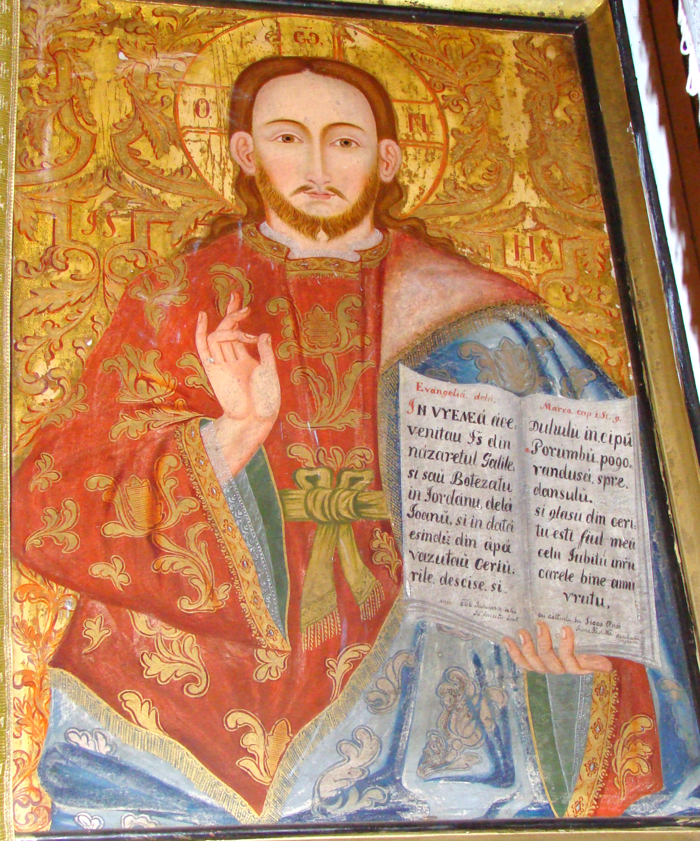 Biserica de lemn „Sf.Nicolae”, cătun Dric, județul Alba